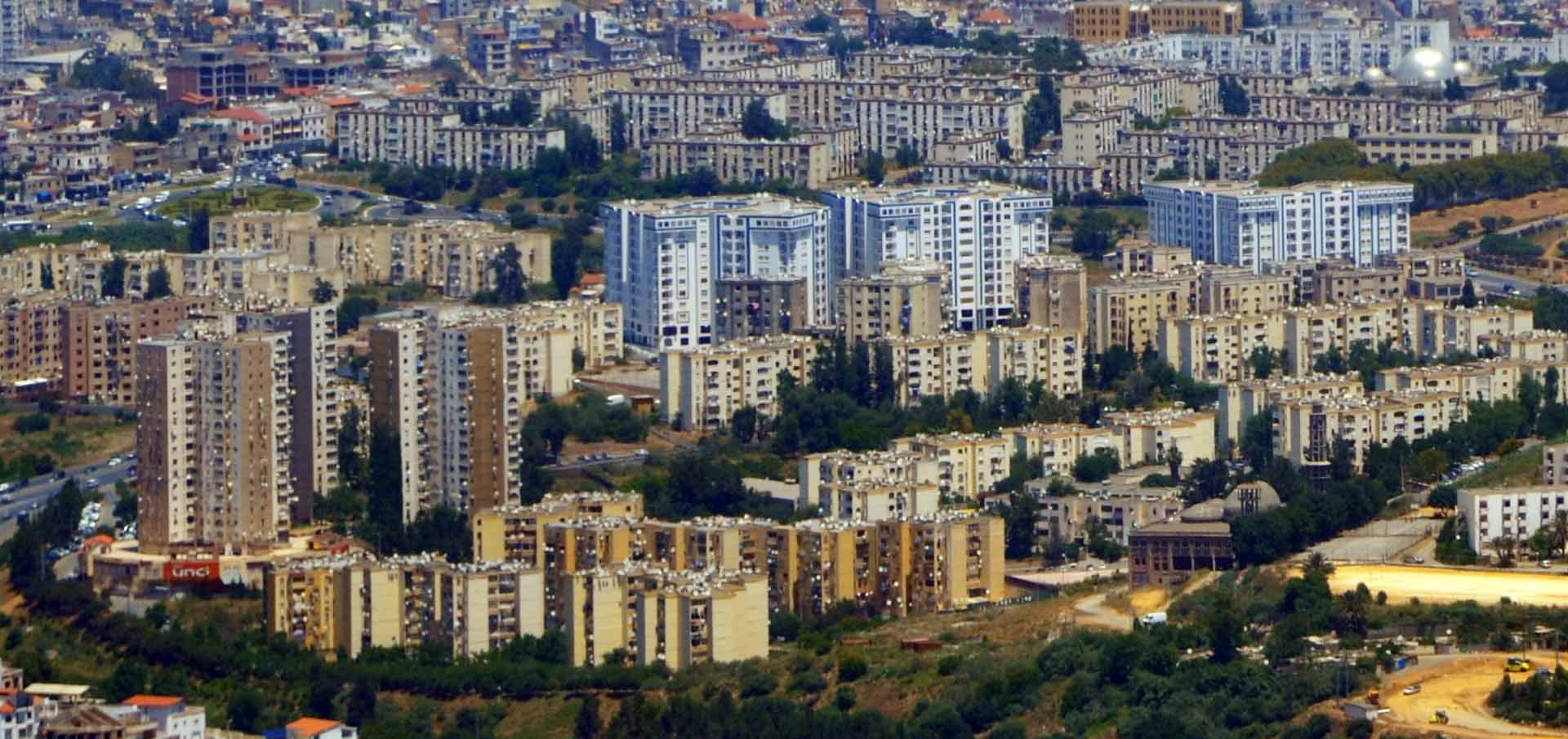 Vue générale du quartier Garidi à Kouba